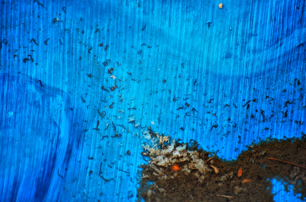 പ്ലാസ്റ്റിക് കവറിൽ കെട്ടിക്കിടക്കുന്ന വെള്ളത്തിൽ വളരുന്ന കൊതുകിൻറെ ലാർവകൾ